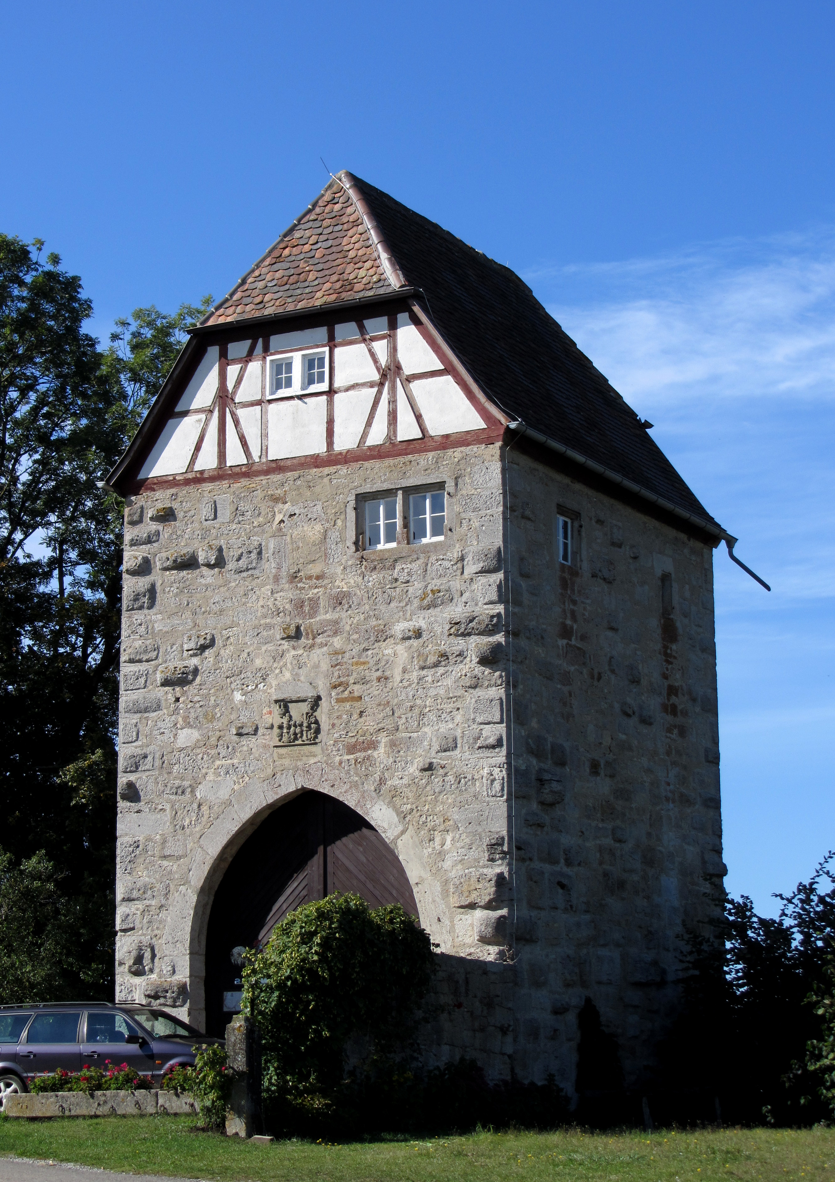 Lichteler Landturm